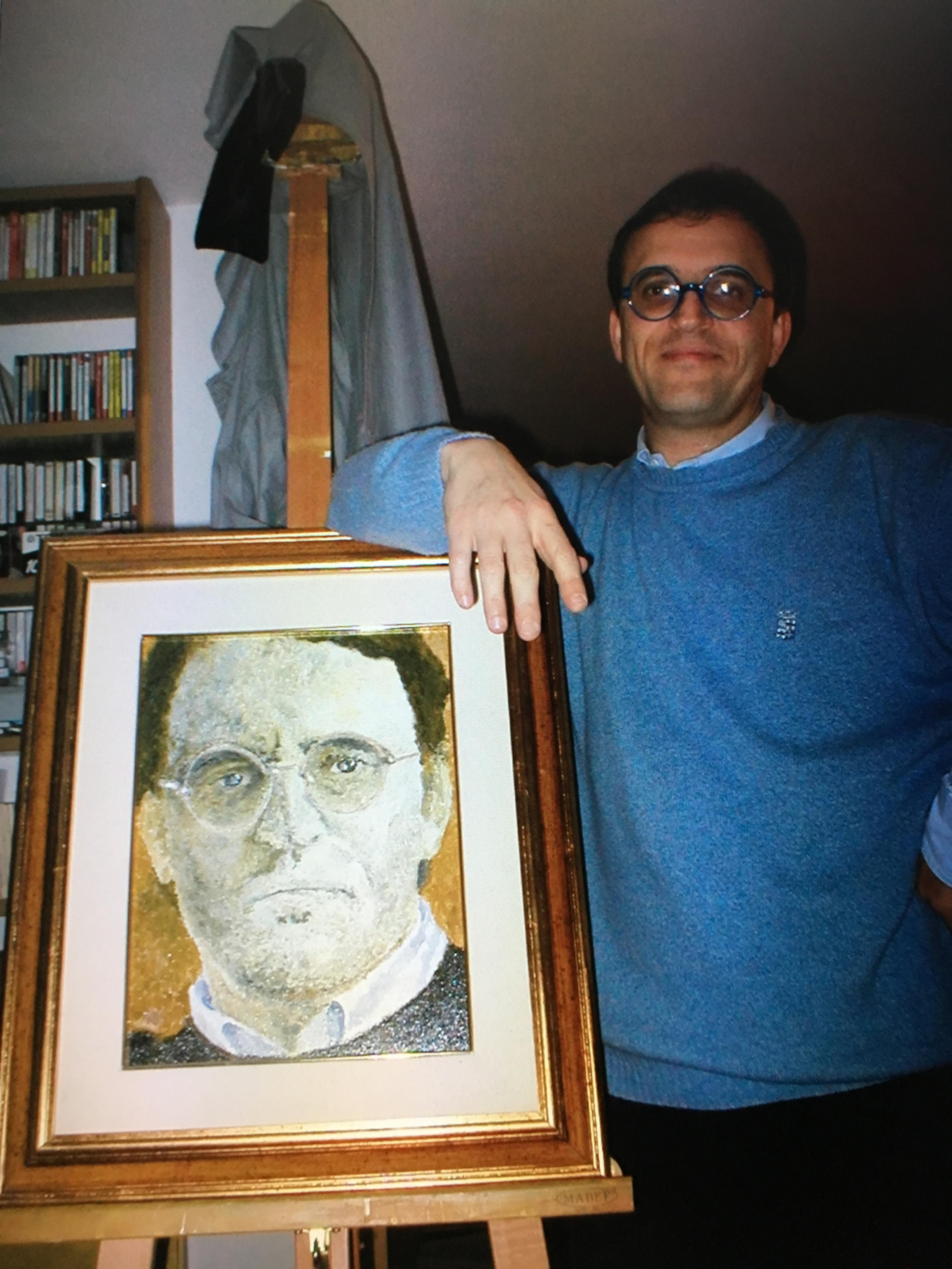 Carlo Pedini mit Selbstbildnis